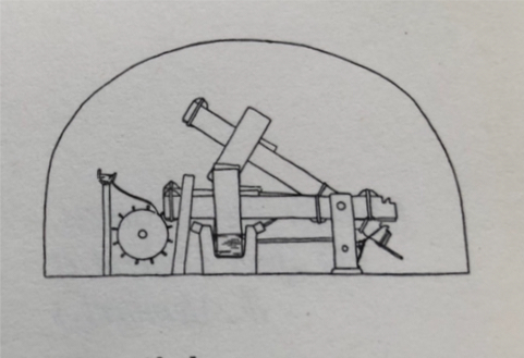 Détails des marteaux sous la voûte du moulin d'après M. Audin.